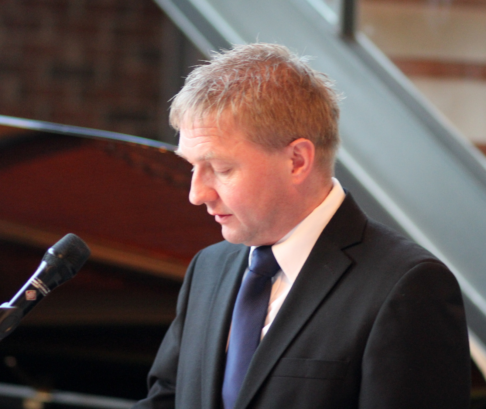 Pål Morten Borgli utdeler av erkjentligheter av Sandnes kommune 1. januar 2014.